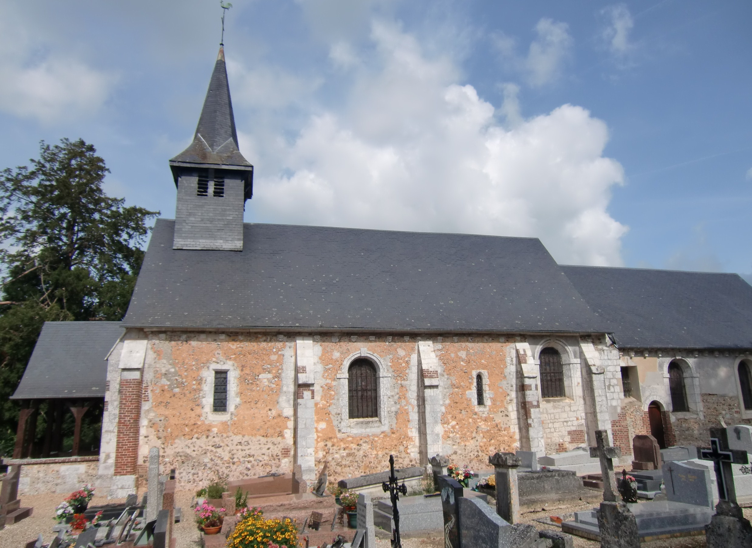 église Notre-Dame à Honguemare-Guenouville (Eure, Normandie, France).